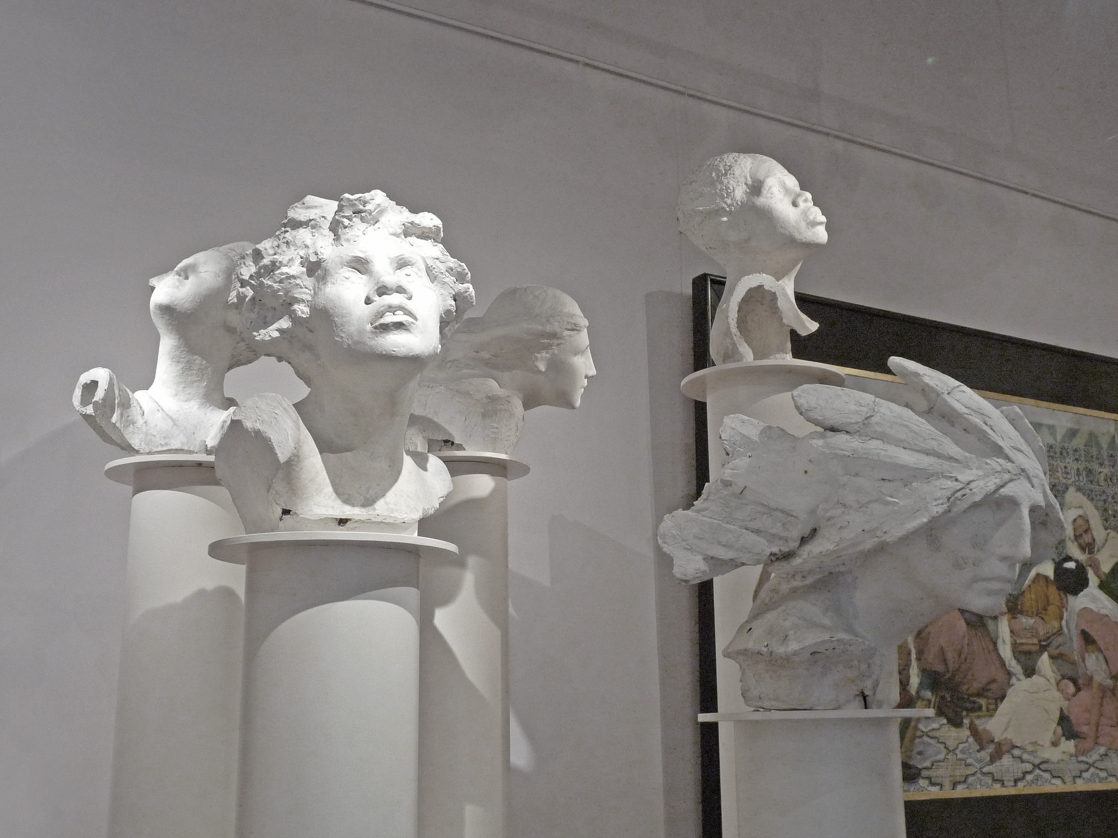 René de Saint-Marceaux : études des têtes des cinq continents pour le monument de l'Union postale universelle, l'Europe, l'Amérique, l'Asie, l'Océanie, l'Afrique. Plâtre (Musée des beaux-arts de Reims)